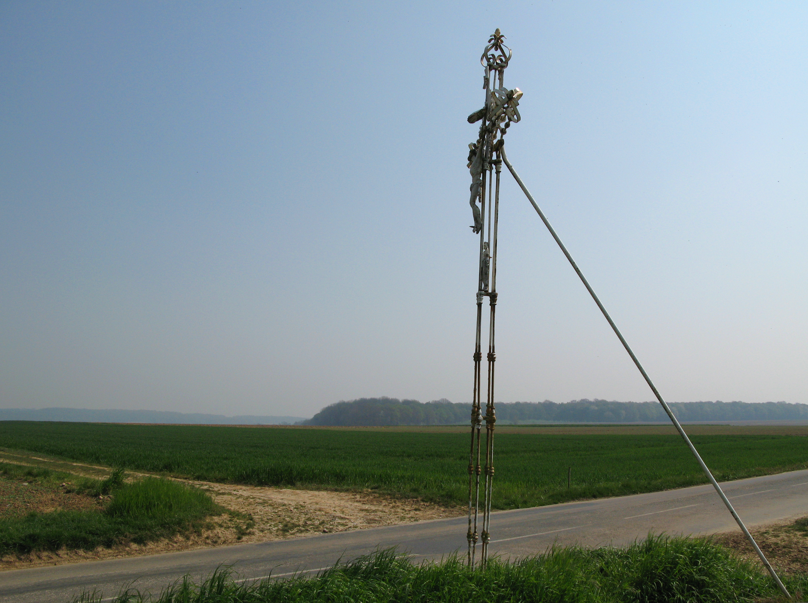 Briquemesnil-Floxicourt (Somme, France) Calvaire sur la route de Cavillon.